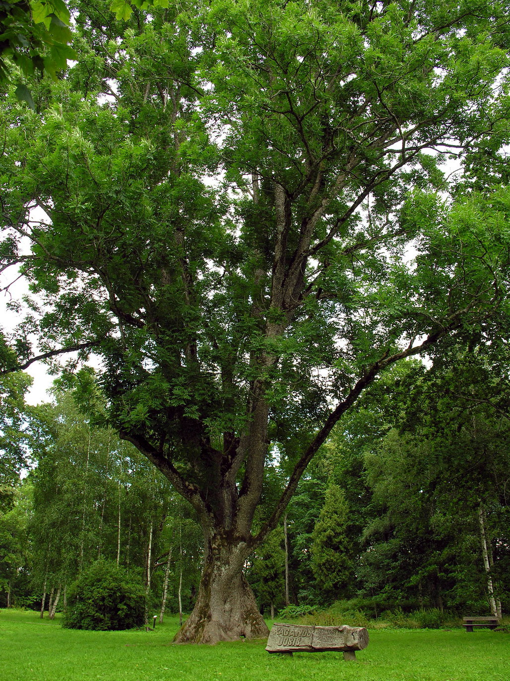 Žemaitėška: Platelē (lt. Plateliai). Raganas ousis - gamtuos paminklos. Žemaitėjės naciuonalėnis parks. Puortegrapėje Algirda, 2007-07-23, Žemaitėjė